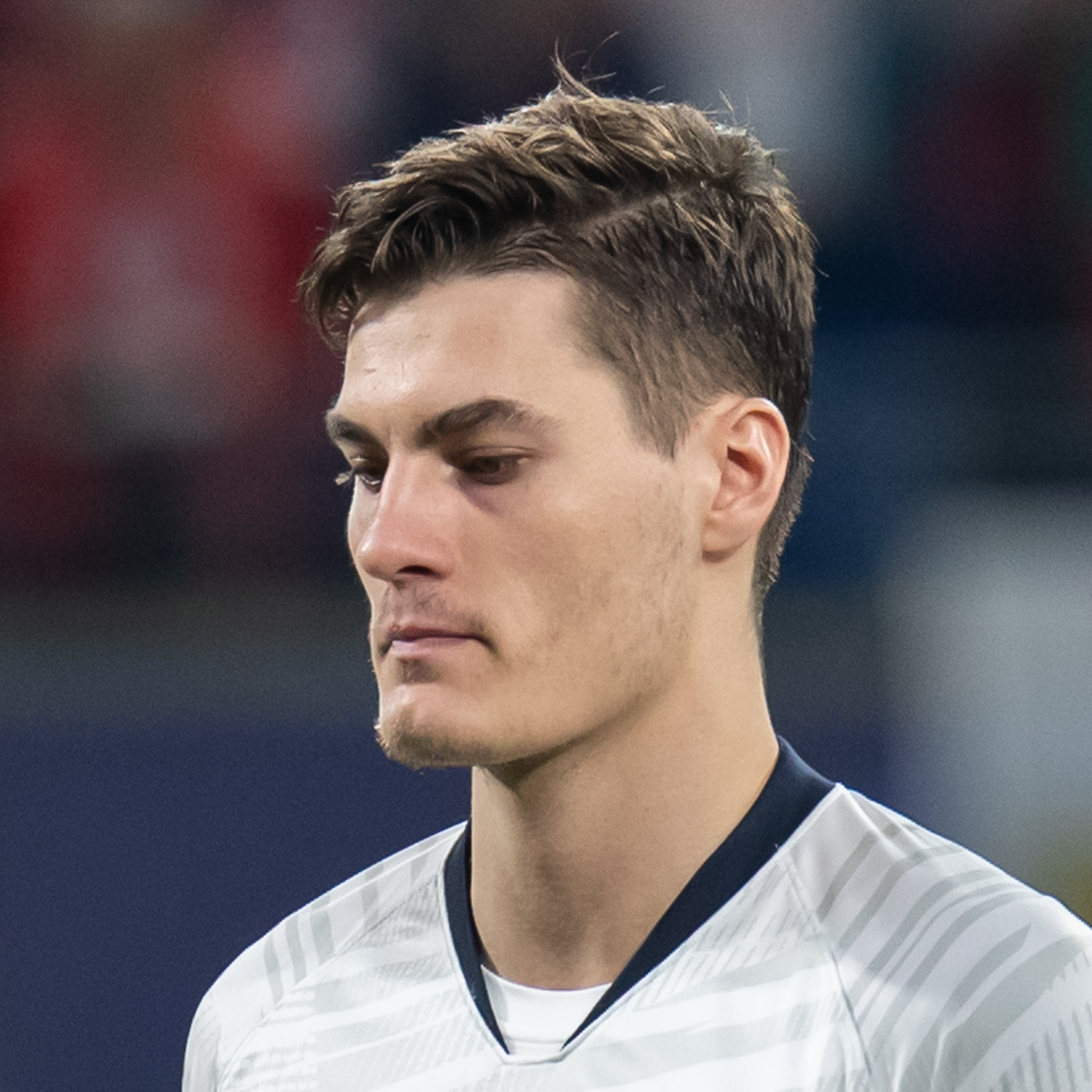 Fußball, Männer, UEFA Champions League Achtelfinale, RB Leipzig - Tottenham Hotspur; Patrik Schick (RB Leipzig, 21)